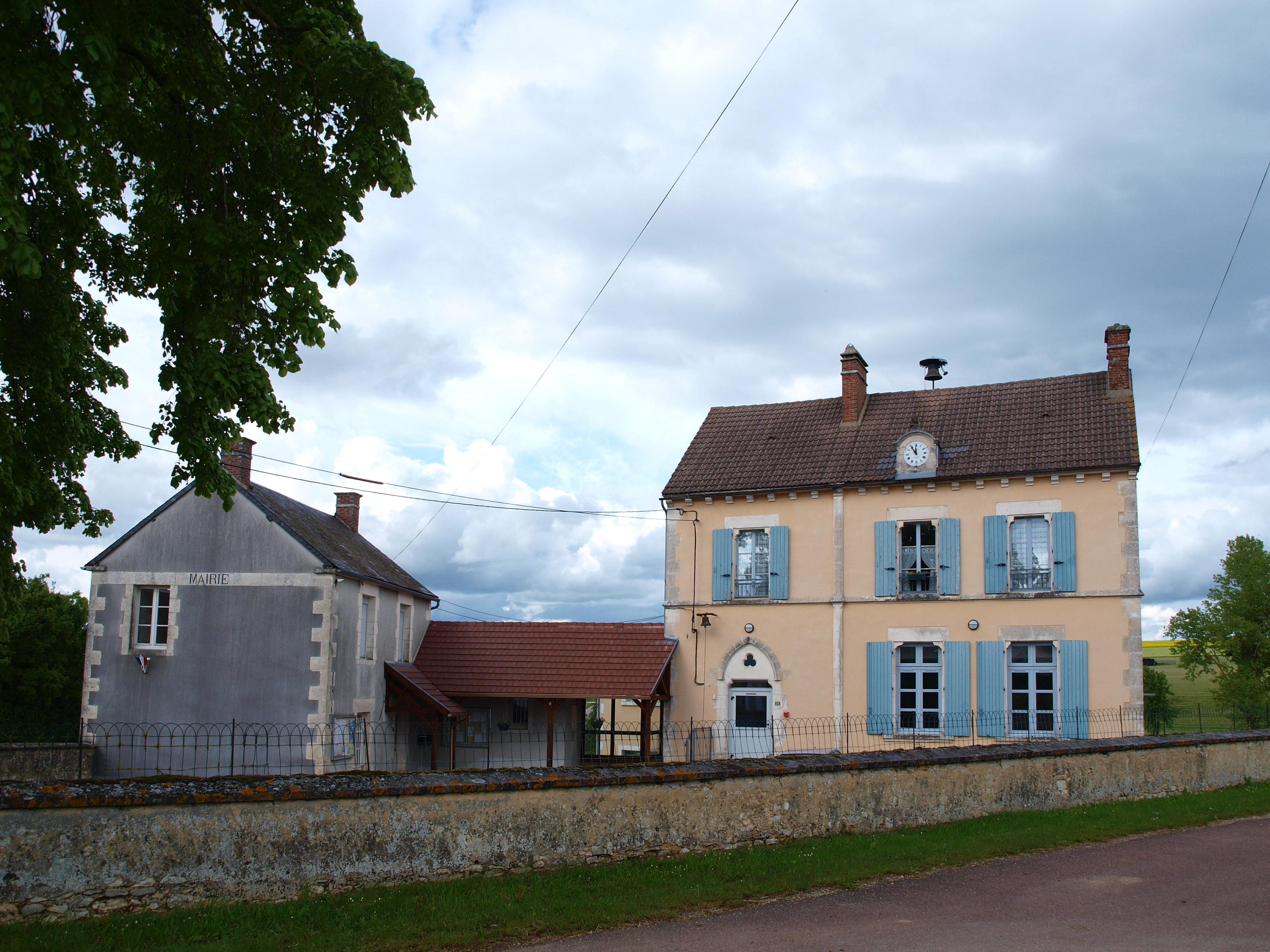 Sementron (Yonne, France) , hameau de Coulon: la mairie.